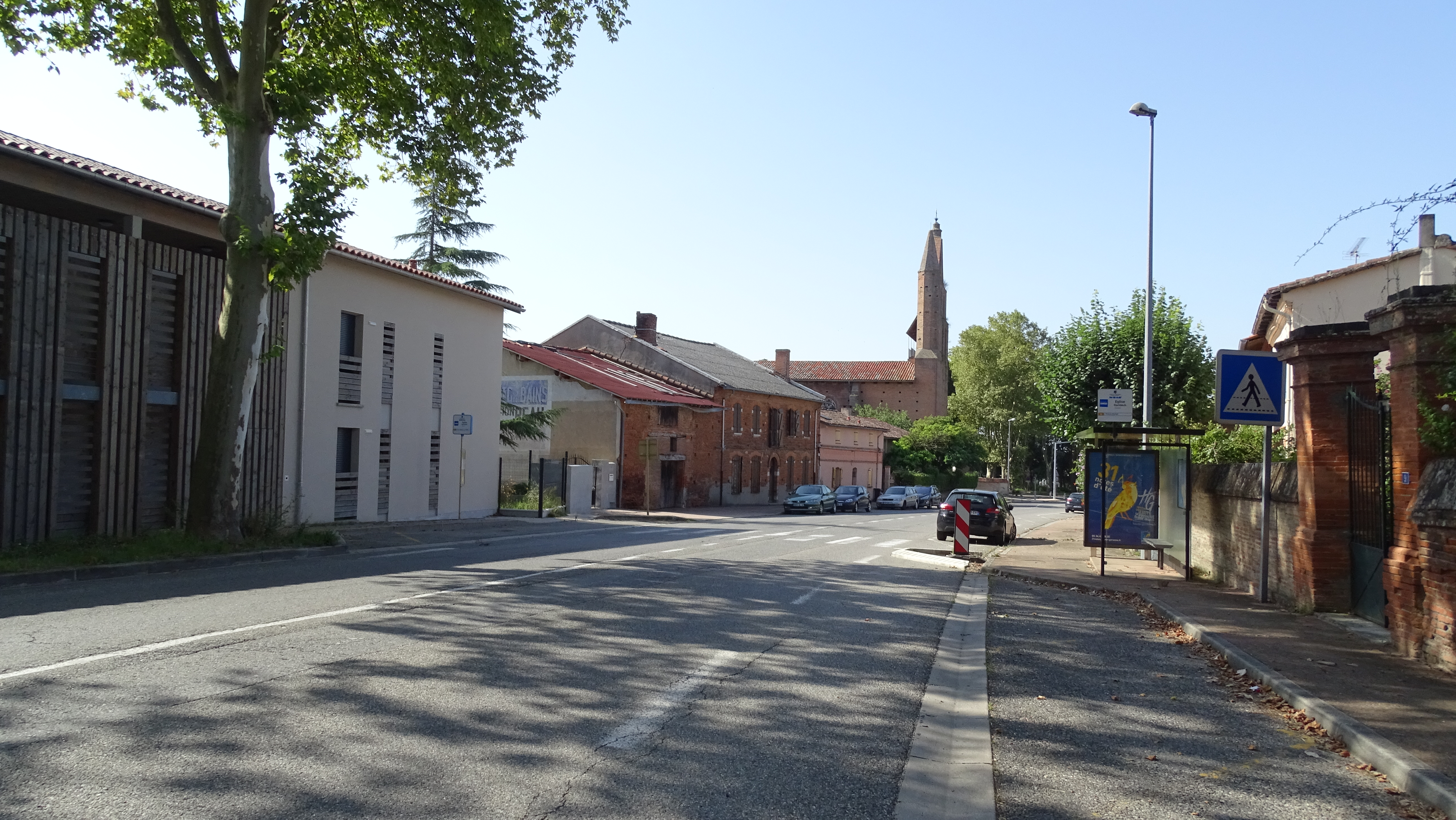 Rue de Garidech